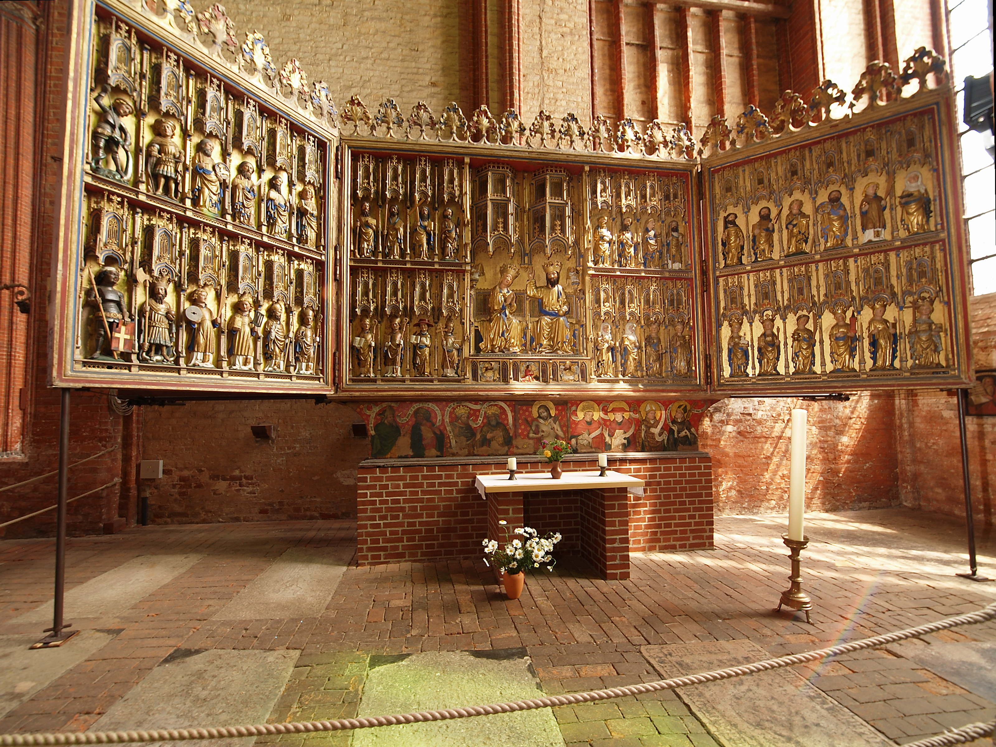 St. Nikolai in Wismar, Altarretabel von St Georgen im Seitenschiff